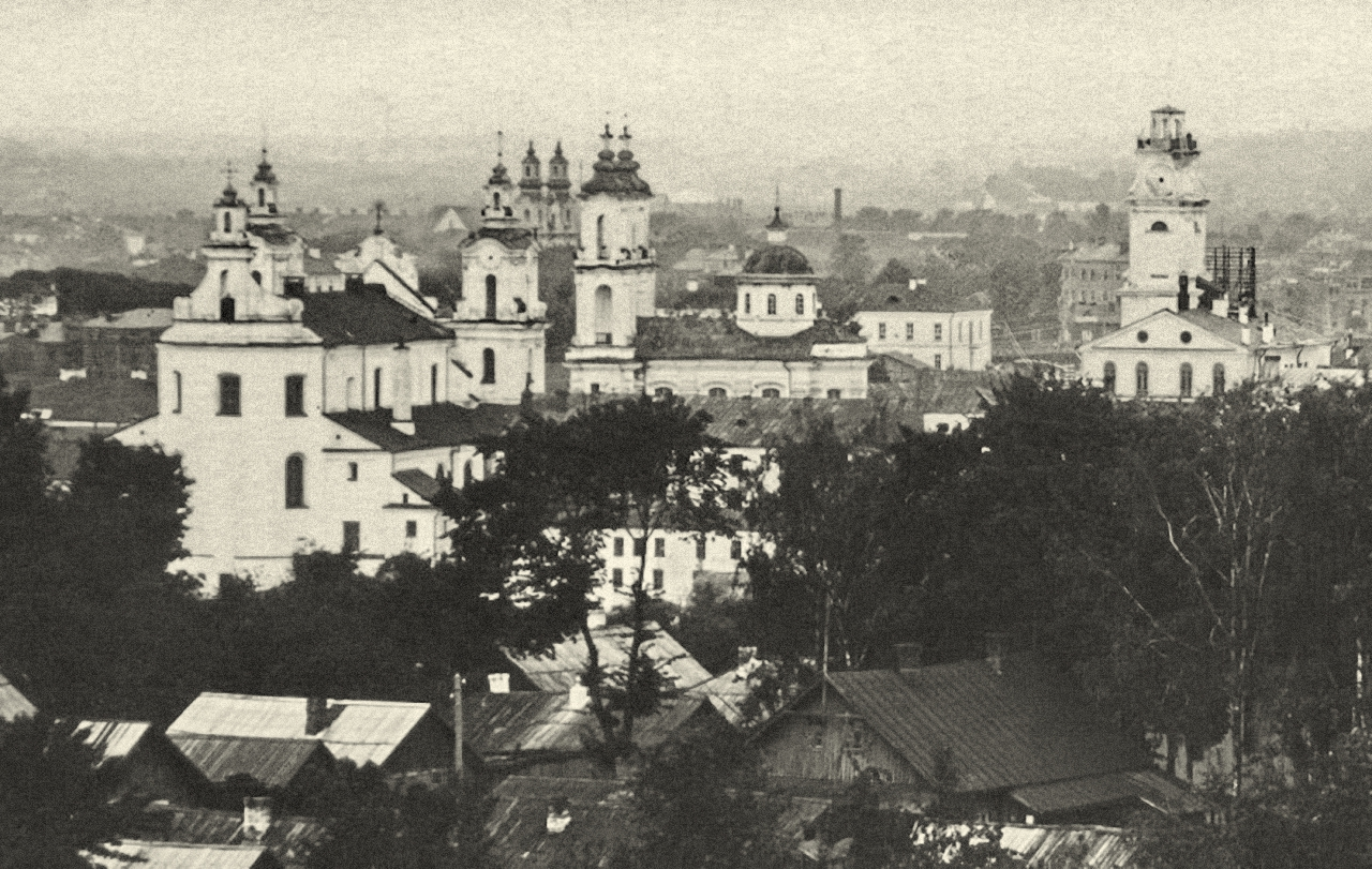 Беларуская (тарашкевіца): Віцебск (Viciebsk), панарама з Кстоўскай гары (Kstoŭskaja hara)